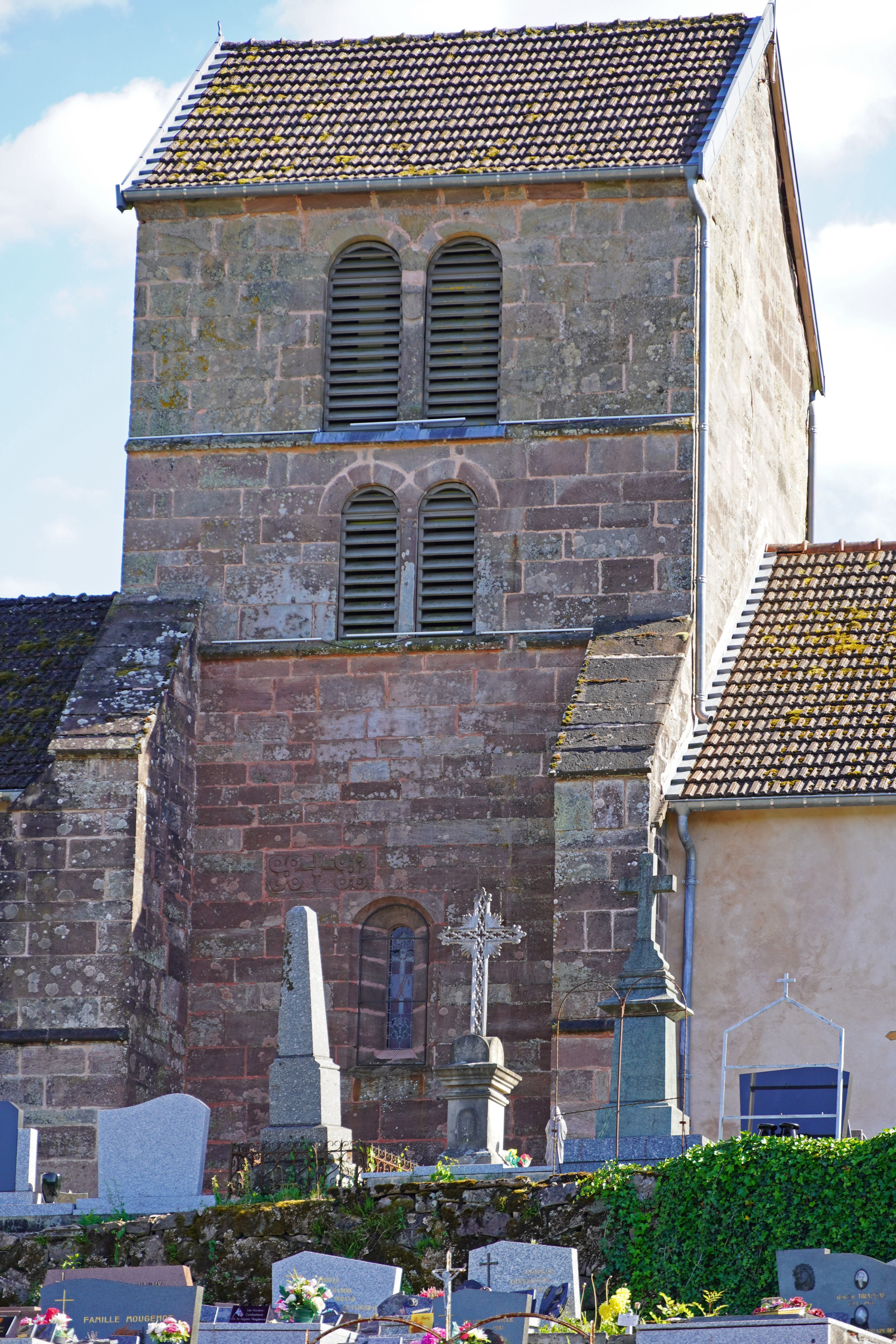 Clocher de la chapelle Saint-Martin de Faucogney-et-la-Mer.